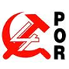 logotipo del POR 1993-2013